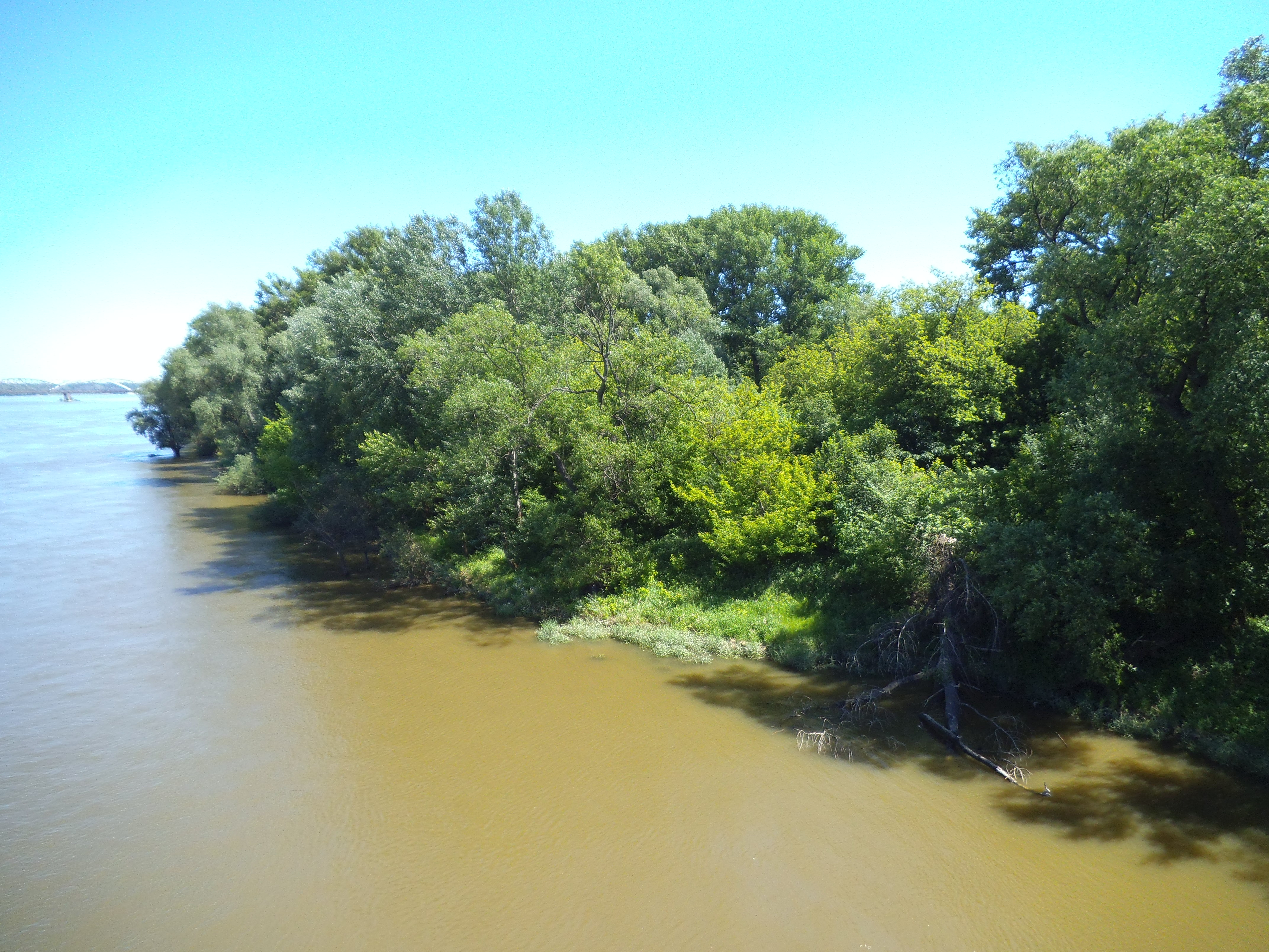 Kępa Bazarowa w Toruniu